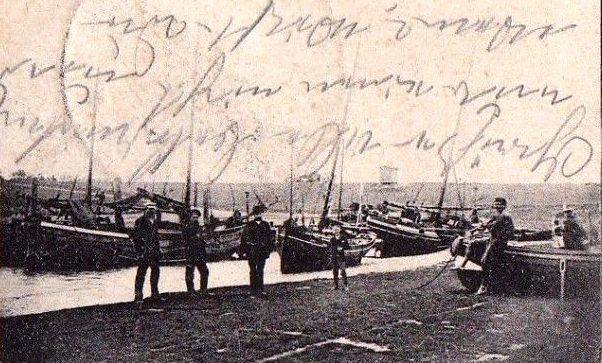 Die bis zur Erfindung des Fischkutters gebräuchlichen Boote wurden im Deichvorland auf den Strad gezogen.